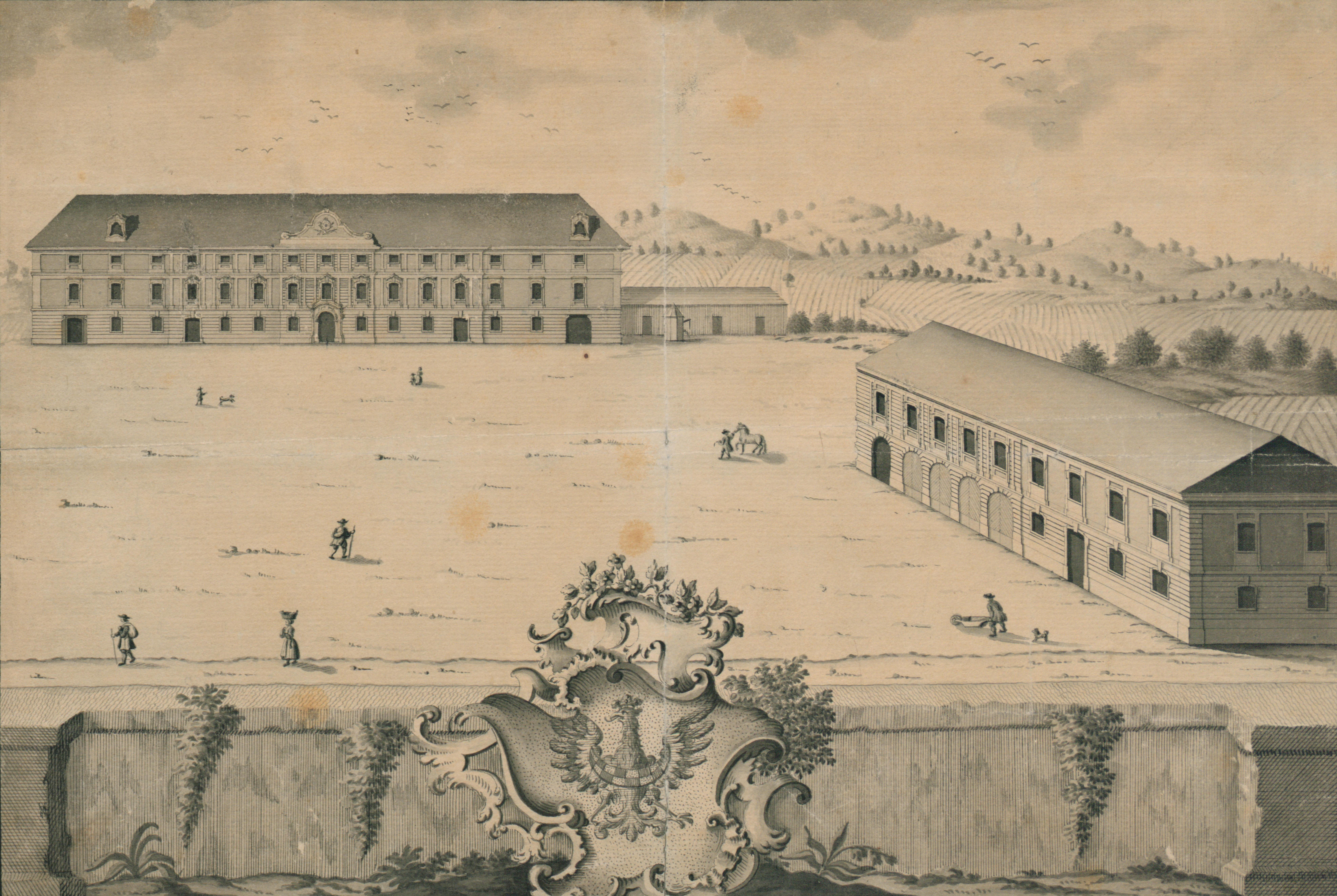 Desselbrunnerjev dvorec na Selu pri Ljubljani